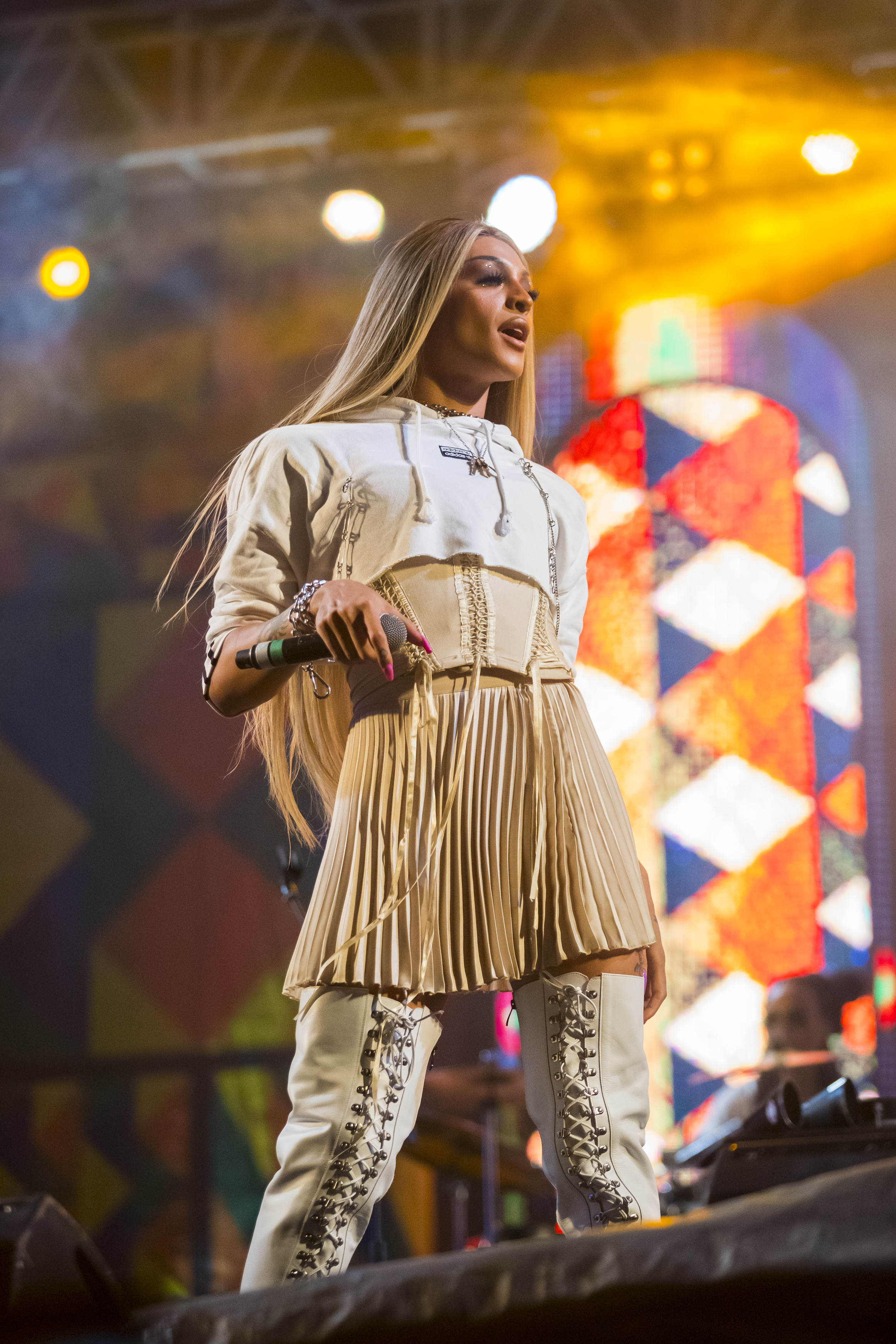 08 de Fevereiro de 2020 - Belo Horizonte, MG FESTIVAL S.E.N.S.A.C.I.O.N.A.L! 8 A Esplanada do Mineirão recebe a oitava edição do festival, que reúne quase 40 atrações. Em clima de pré-carnaval, a festa celebra 10 de anos de história do S.E.N.S.A.C.I.O.N.A.L! Emicida convida Pabllo Vittar. Foto: Bruno Figueiredo/Área de Serviço